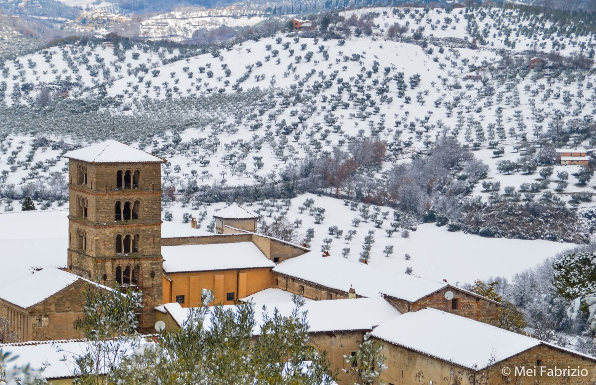 nevicata del 26 febbraio 2018